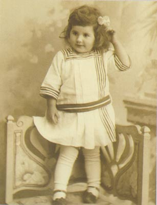 Вераніка Залатарова – пляменніца Дзіядора Дзябольскага, сябра Максіма Багдановіча, якой ён сімпатызаваў і чыім імем назваў сваю паэму “Вераніка”. [1900-я гг.].